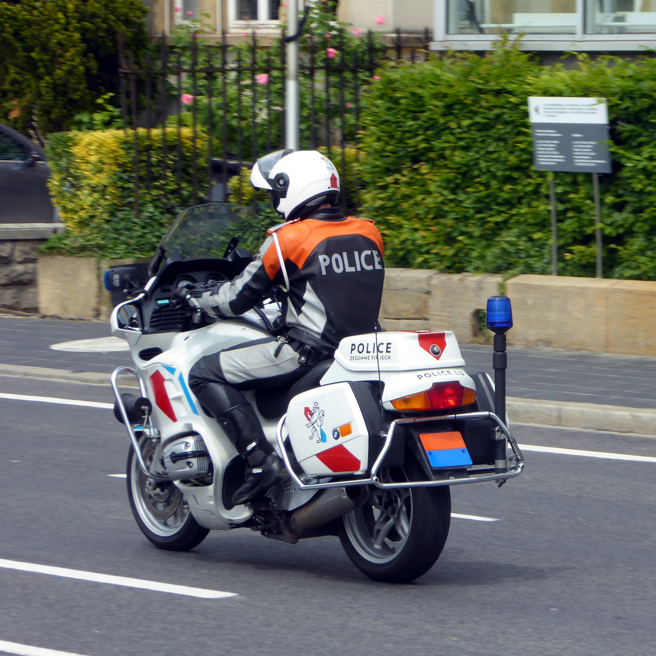 Luxemburg (LU), Polizeimotorrad mit anonymisierten Kennzeichen als Konvoibegleitung.